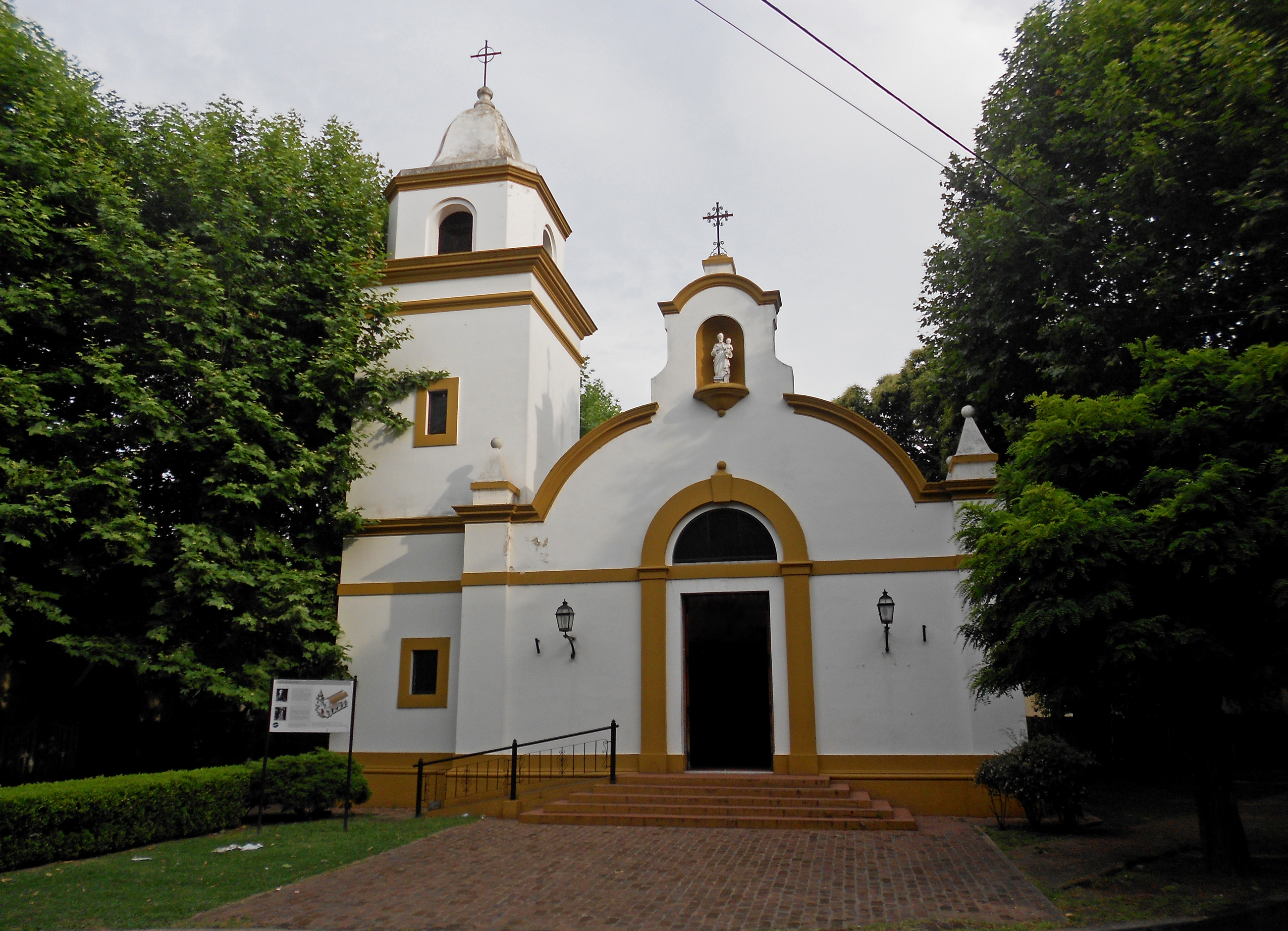 Capilla San José Obrero (1966), obra de Alejandro Bustillo en el barrio Villa Argentina de Quilmes.